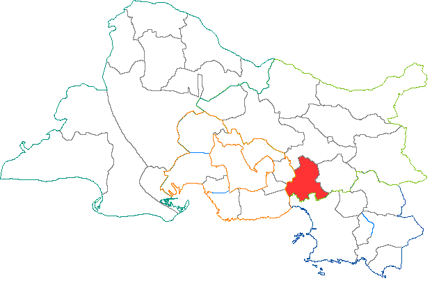 Situation du canton dans le département des Bouches du Rhône (France)